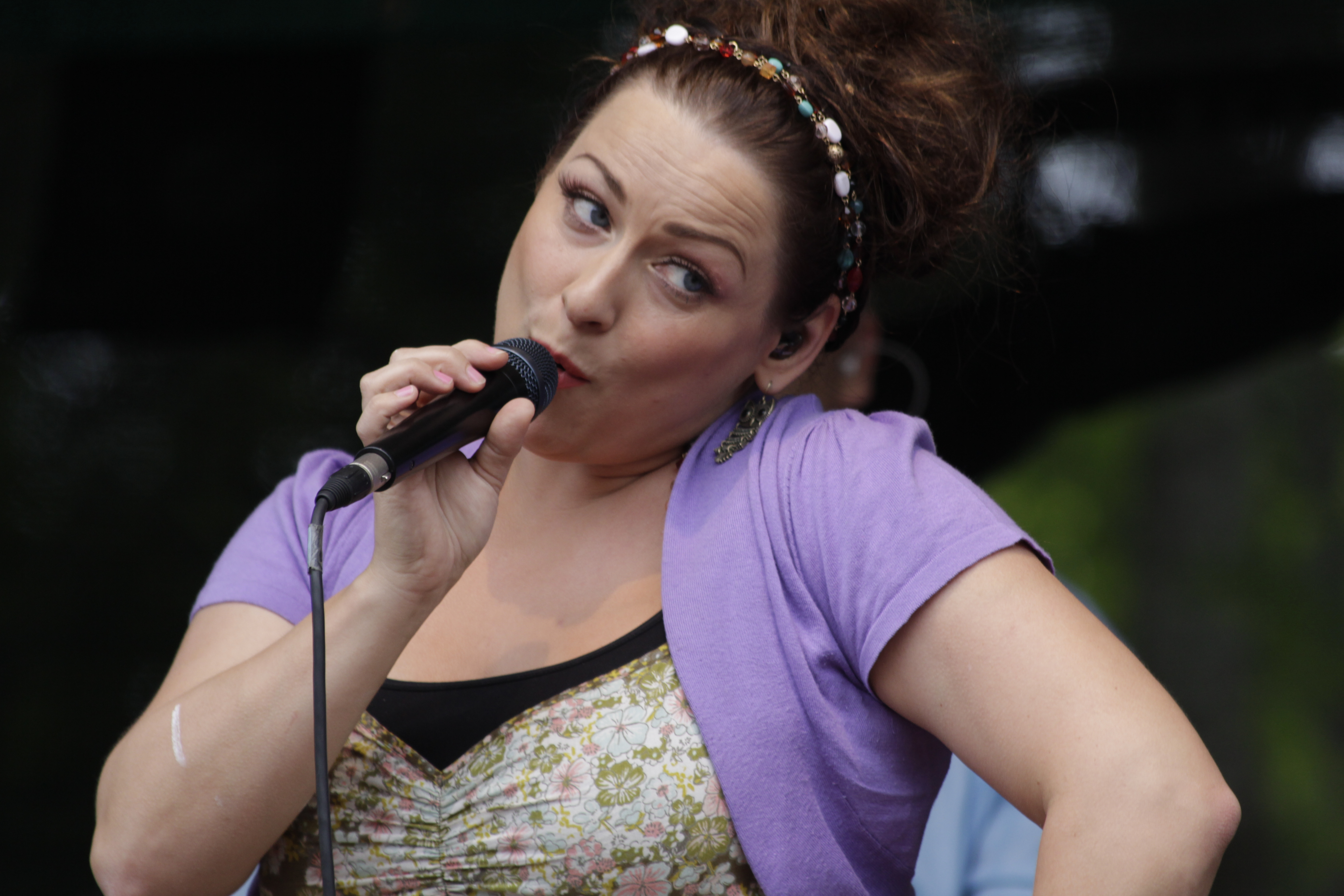 Erin keikalla Ylis'festareilla Ylöjärvellä 18.8.2012